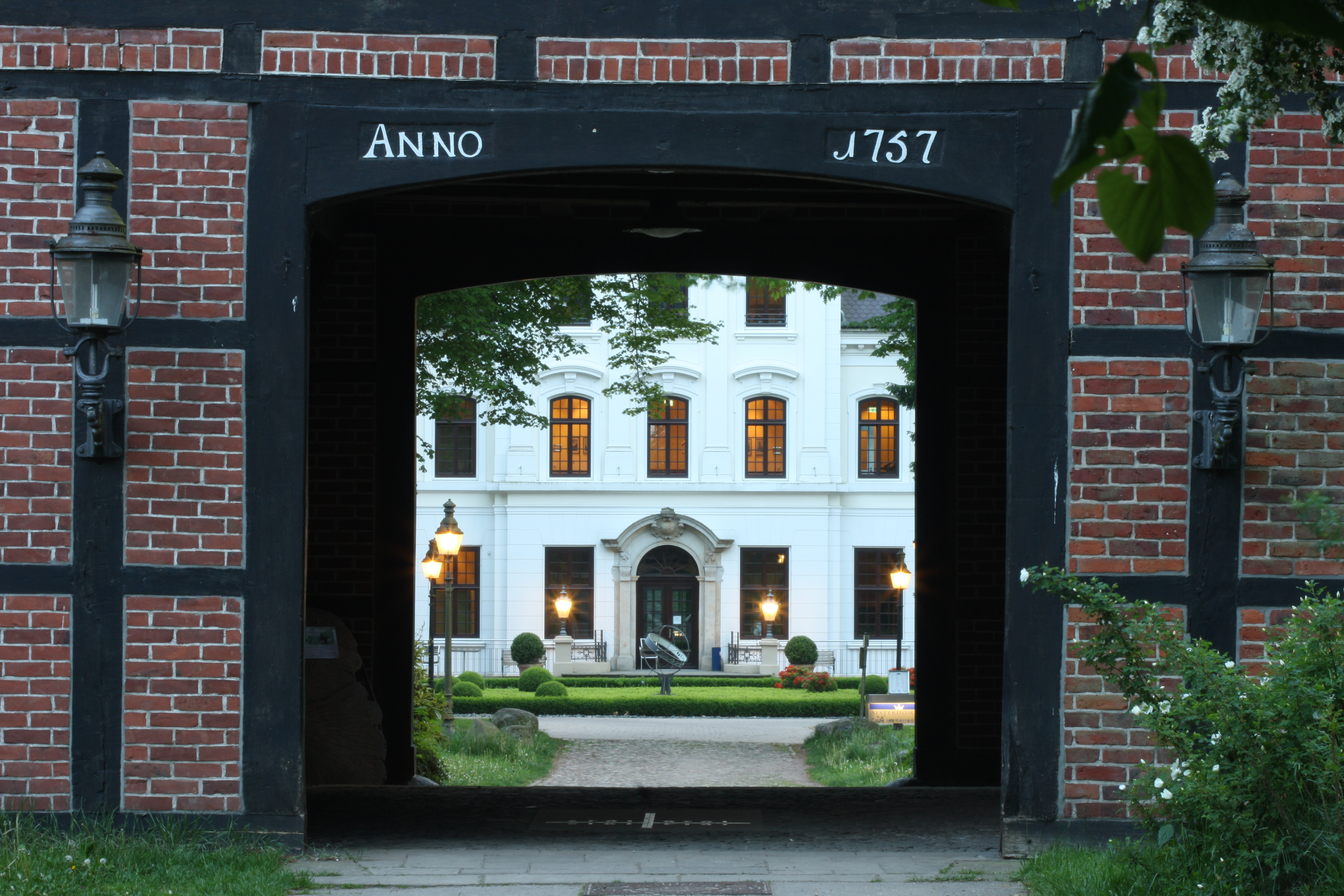 Blick durch das Torhaus auf das Herrenhaus Wellingsbüttel im Hamburger Alstertal (Wellingsbüttler Weg 75a und 71)This is a photograph of an architectural monument.